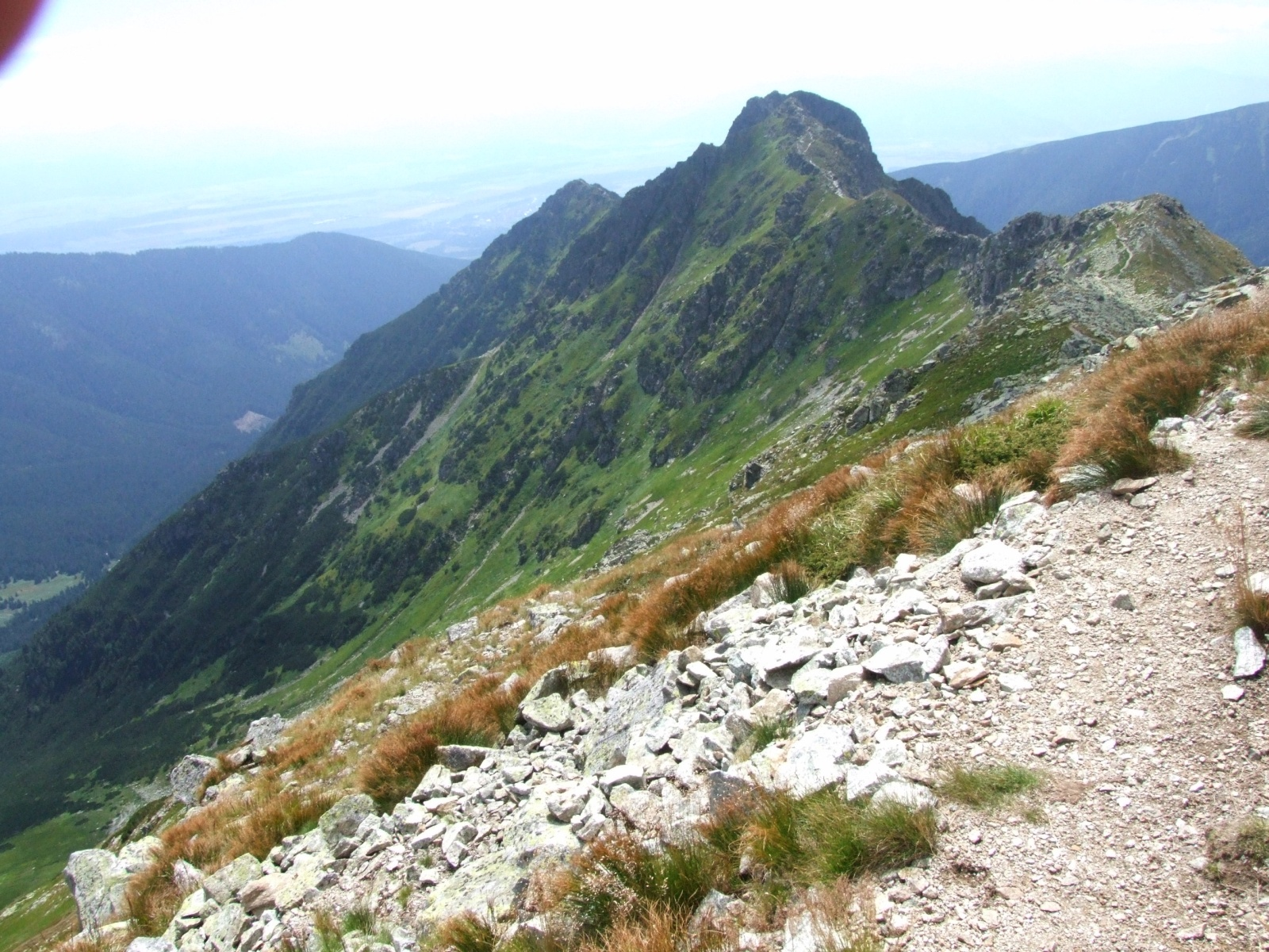 Otargańce (Tatry Zachodnie). Od lewej Niżnia Magura i Pośrednia Magura